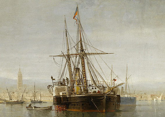 detail: Sidewheeler bridge